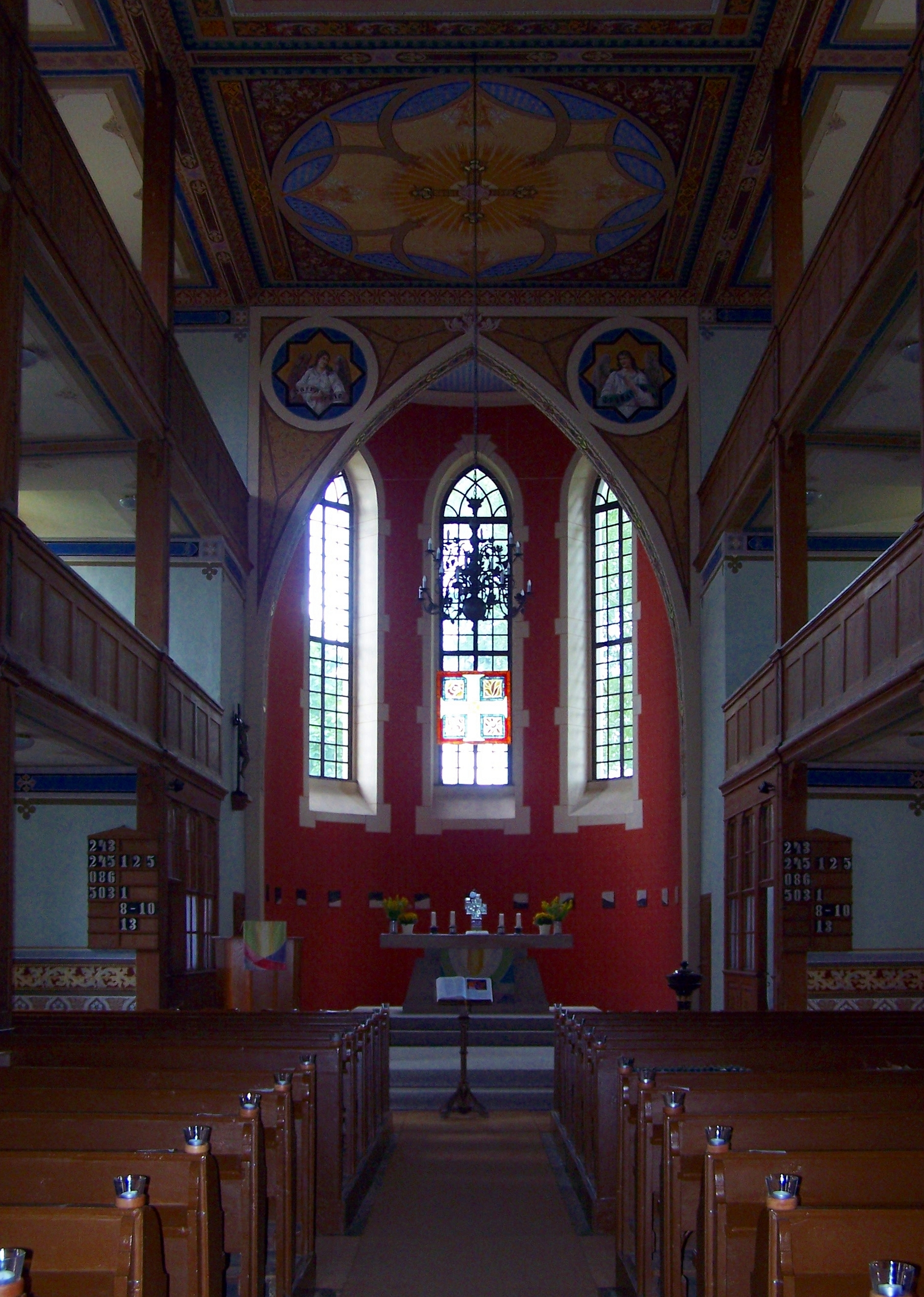 St.-Andreas-Kirche Zadel, Gemeinde Diera-Zehren, Landkreis Meißen